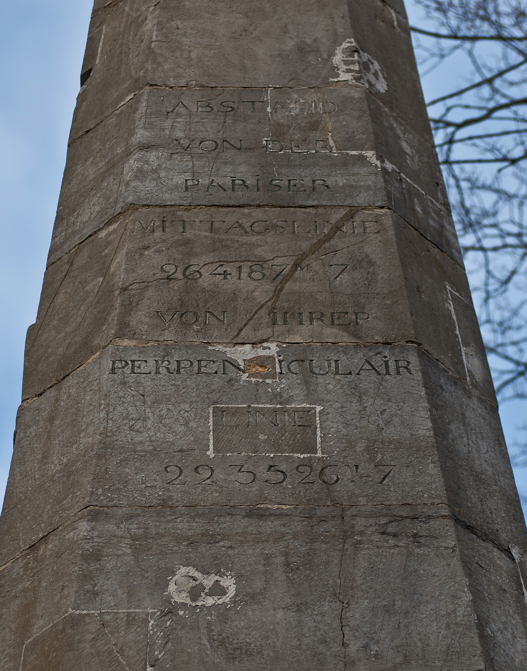 Inschrift auf dem Tranchot-Obelisken (Vermessungsobelisk) auf dem Aachener Lousberg